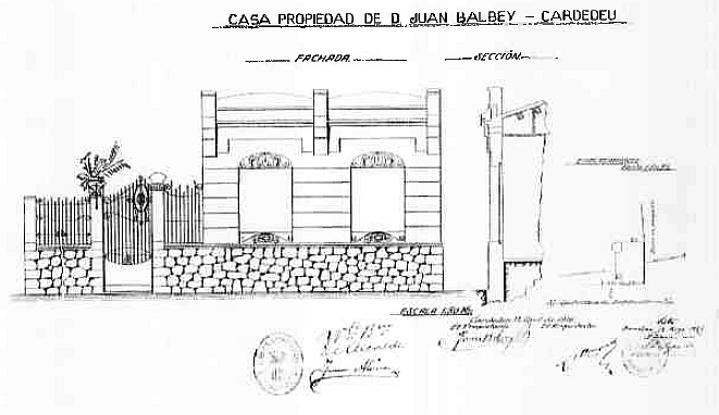 Casa Balvey (Cardedeu) cultura.gencat.cat/Cerca/Fitxa?index=0&consulta=&codi=28572 Projecte d'obra IPA-28572 Projecte d'obra].